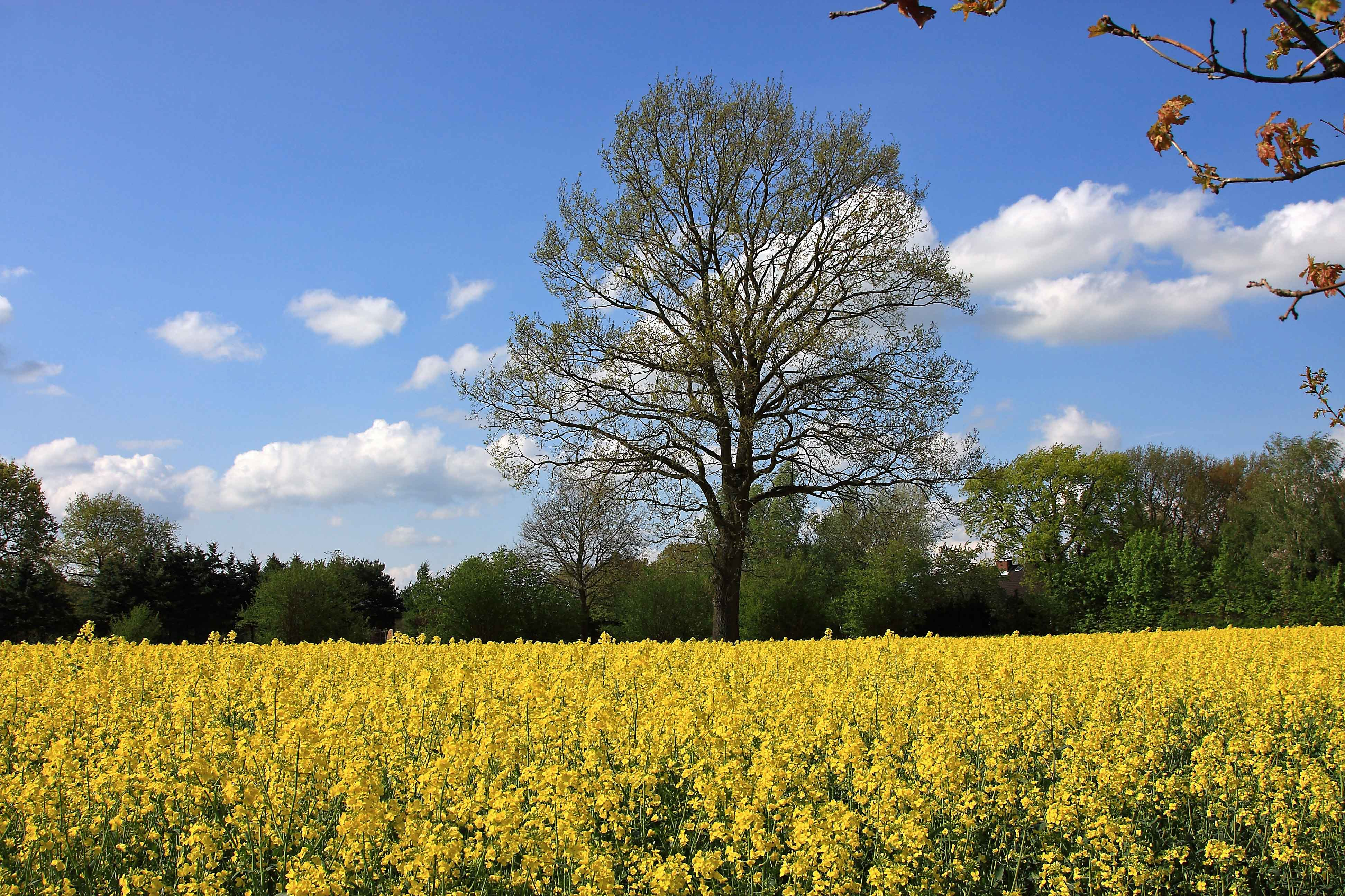 Landschaft am Rande des Duvenstedter Brooks - Wiemerskamper Weg